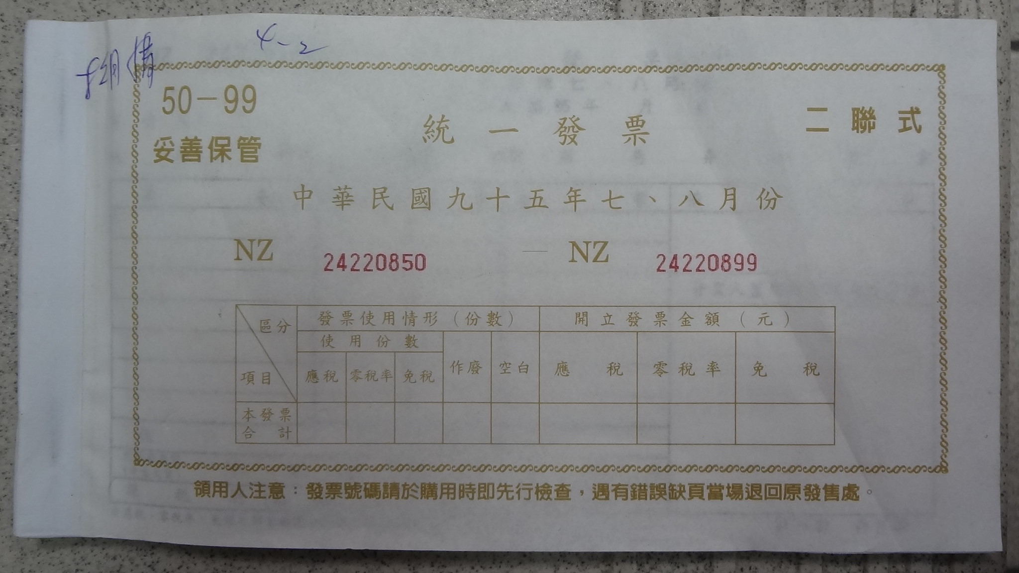 中華民國財政部印刷廠印製的中華民國95年7至8月份二聯式統一發票簿NZ24220850－NZ24220899。